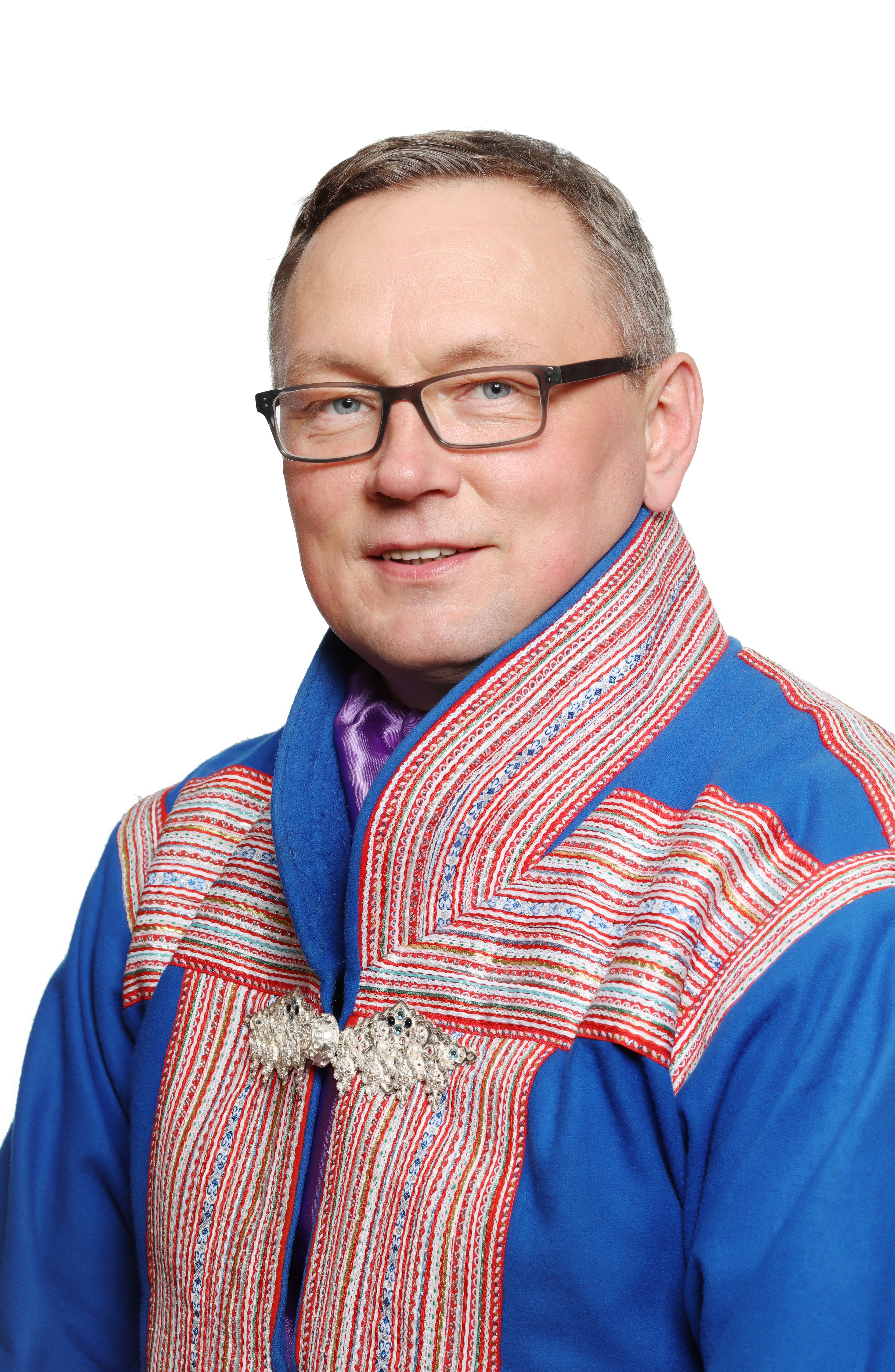 Eira, Hans Ole (Foto: Kenneth Hætta)